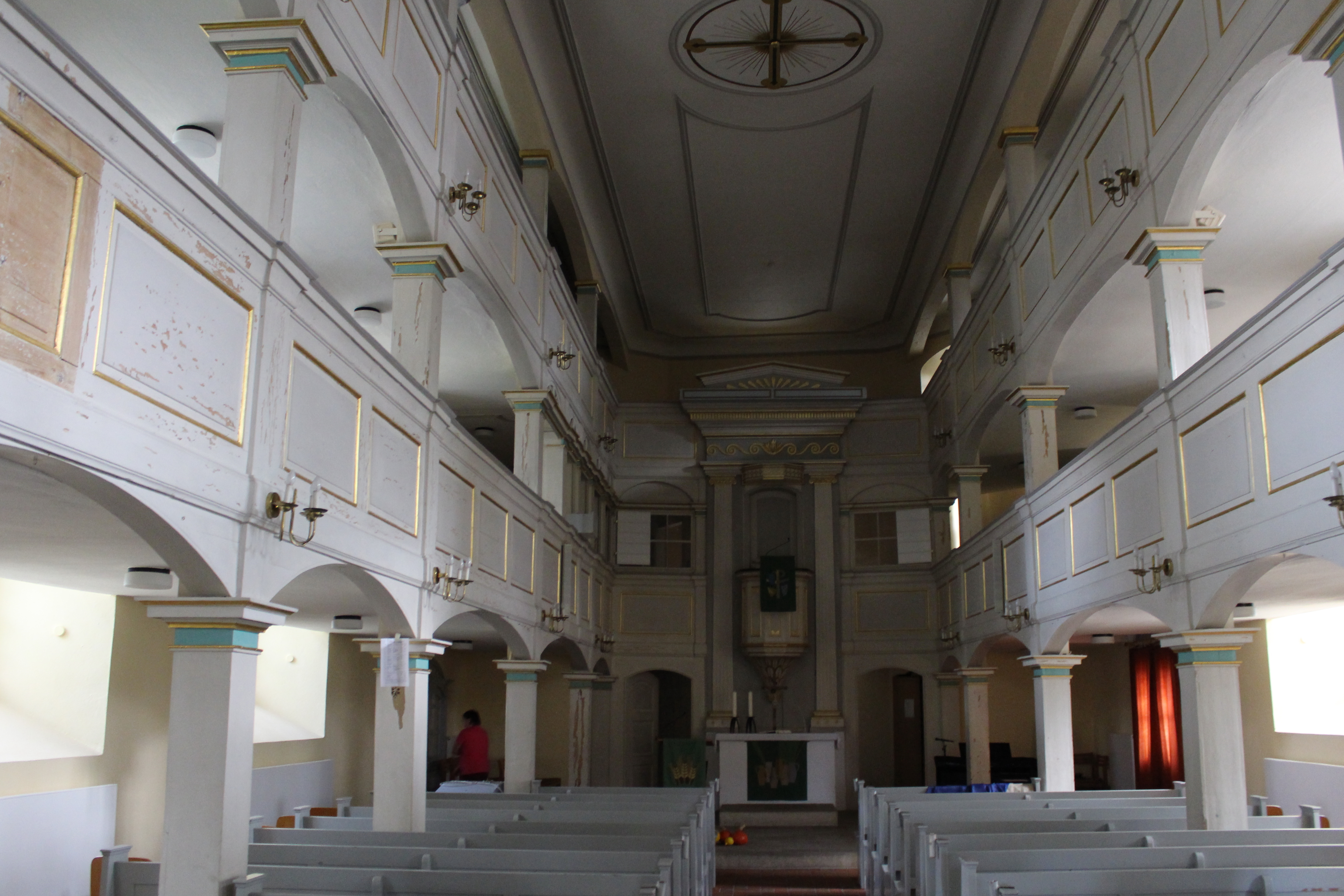 Innenraum der Stadtkirche von Limbach-Oberfrohna